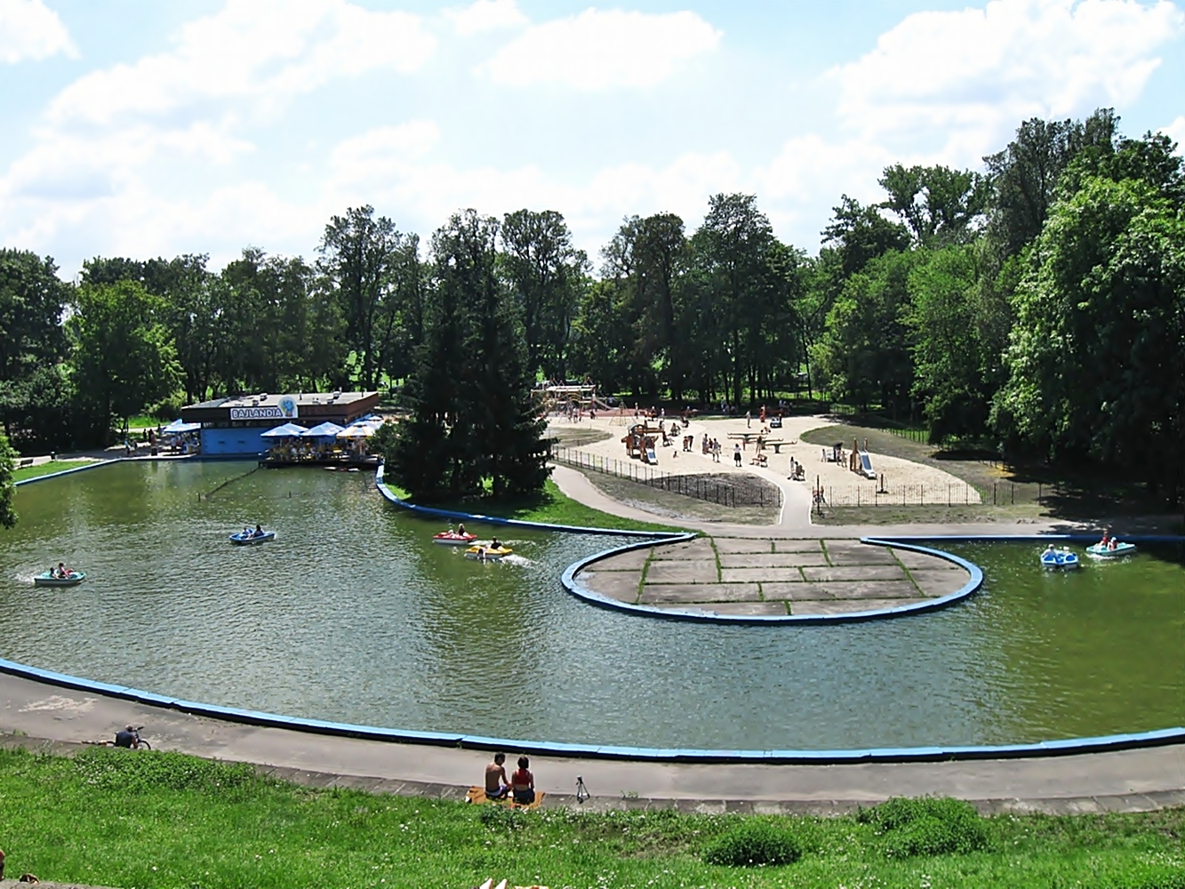 teren parku jordana